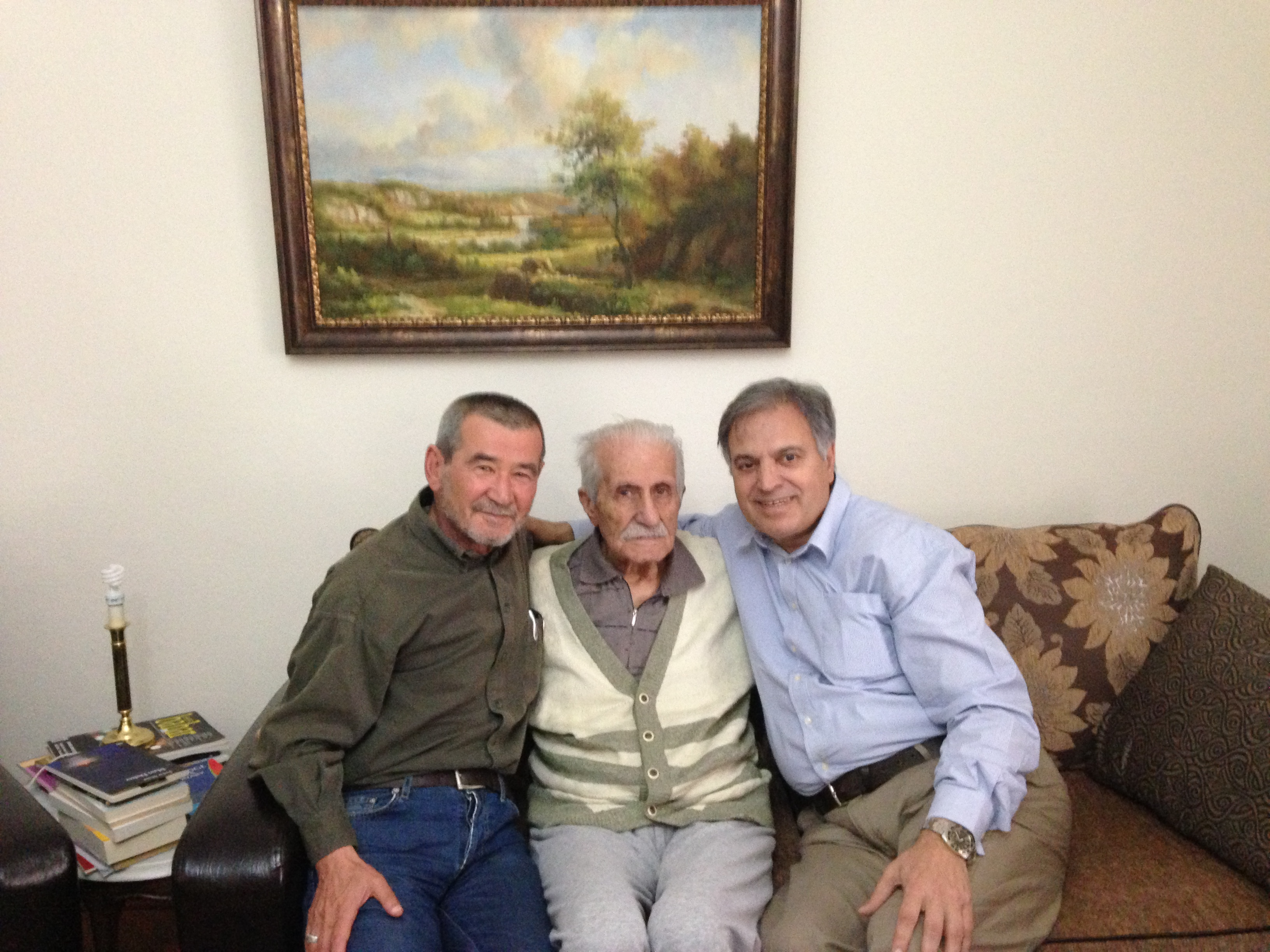 Ahmet Telli Vecihi Timuroğlu ve Oğuz Gemalmaz ile Kazan/Ankara'da 17 Eylül 2013